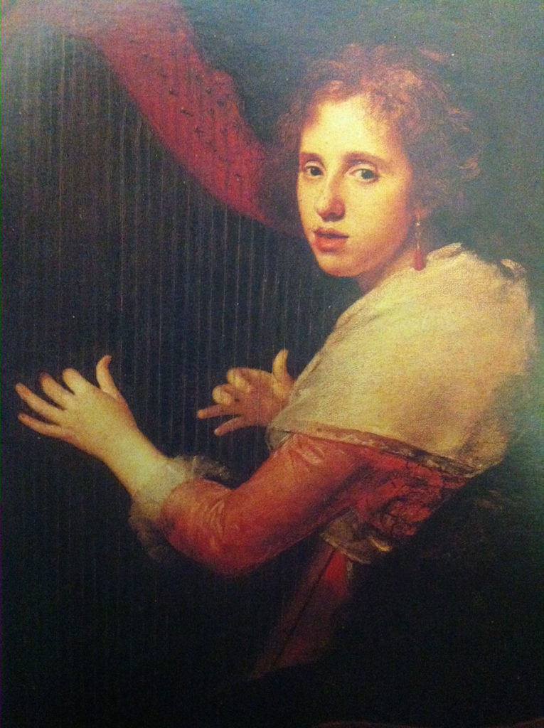 Catherina Rega ritratta mentre suona l'arpa da Costanzo Angelini 1760-1853